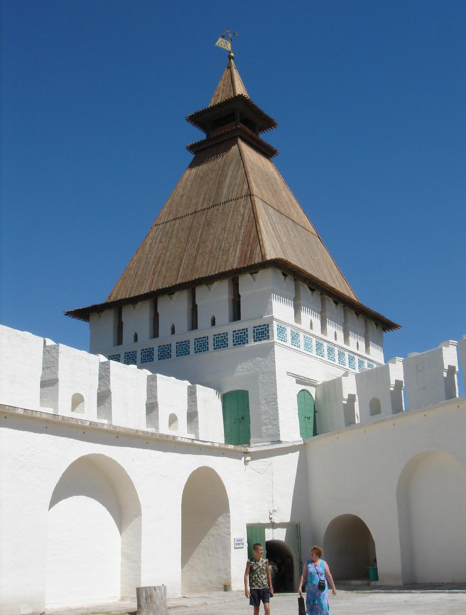 The tower in Astrakhan Kremlin where people were tortured (now museum). Пыточная башня в кремле, где проводились дознания. Сейчас там располагается музей.